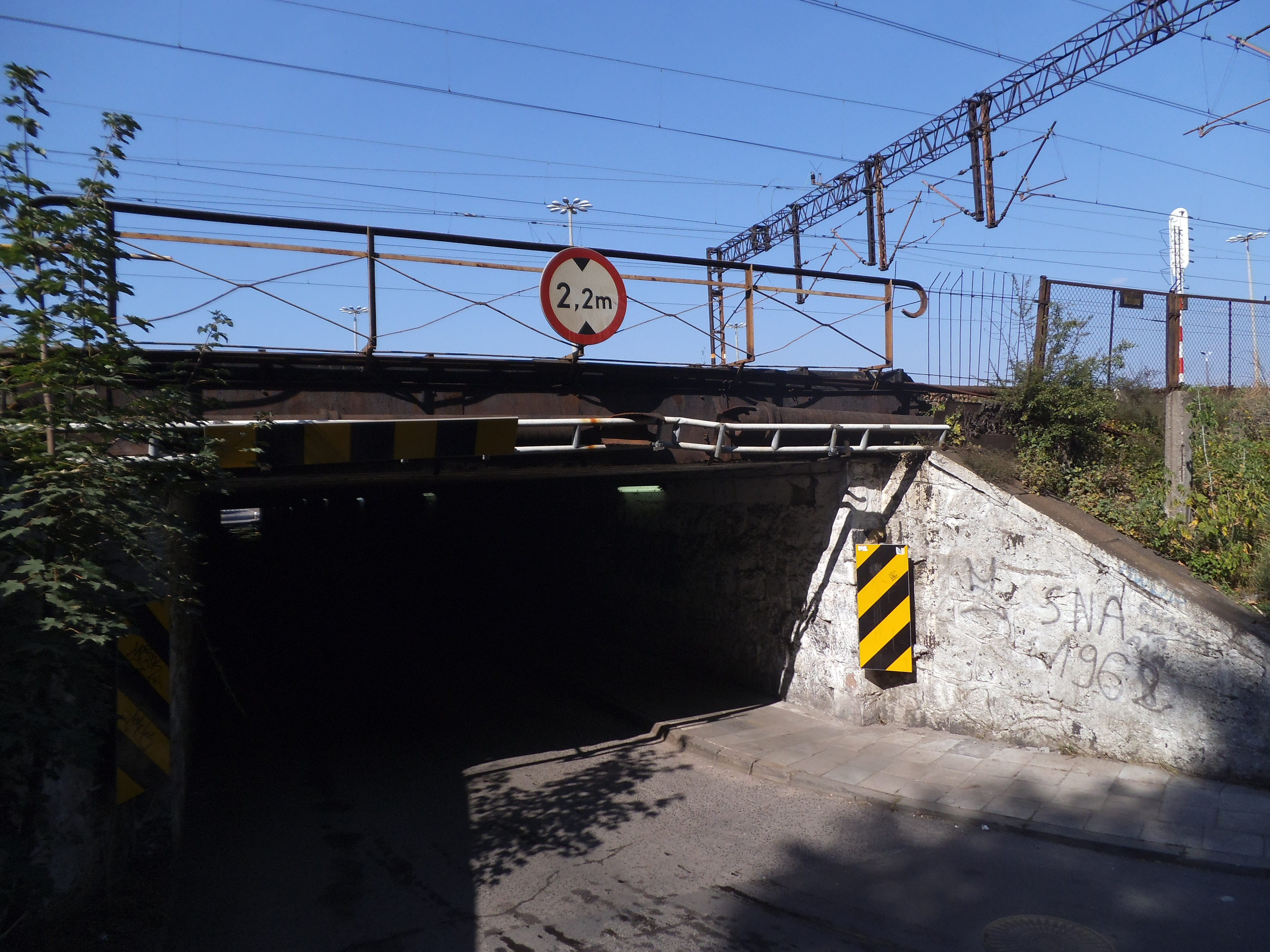 Tunel tzw. "Krowi Mostek" w Toruniu